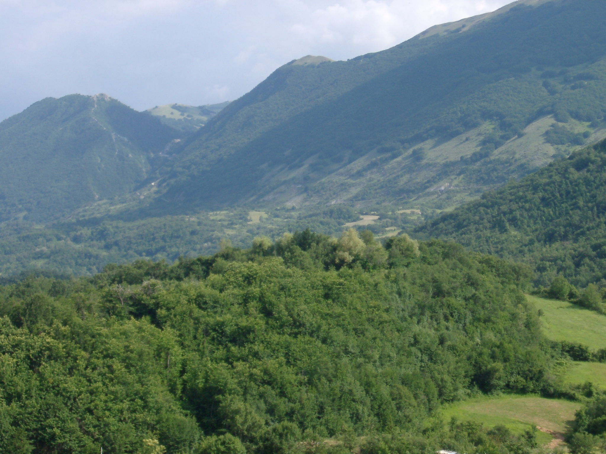 Paesaggio da Pié La Costa